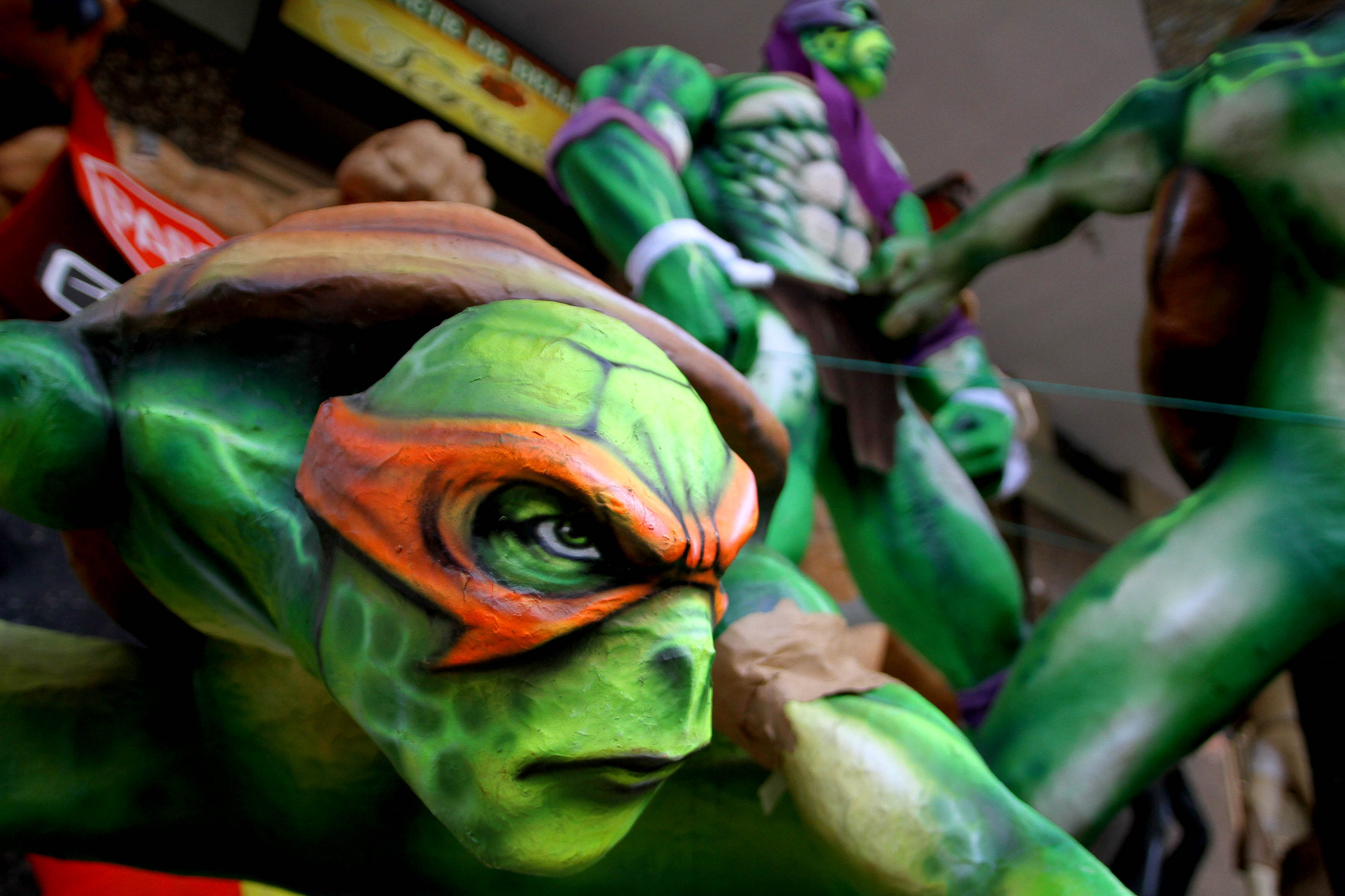 Guayaquil, Ecuador, 29 de diciembre del 2014 (ANDES).-Como en años anteriores la creatividad de varios artesanos se adueña de la calle seis de Marzo donde se exhiben y comercializan los monigotes que serán quemados en el 31 de diciembre, en la gráfica Miguel Angel, personaje de las Tortugas Ninjas Foto:César Muñoz/ANDES